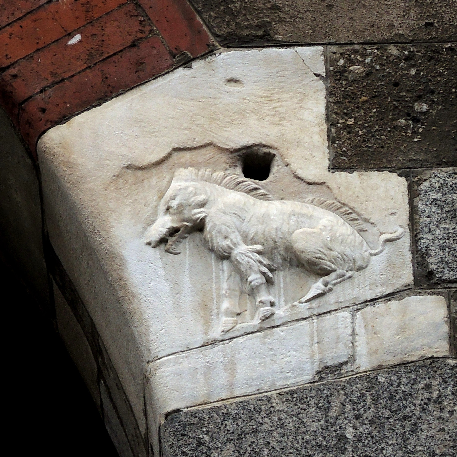 Bassorilievo del Broletto Nuovo con la leggendaria scrofa semilanuta che avrebbe dato origine al nome Mediolanum